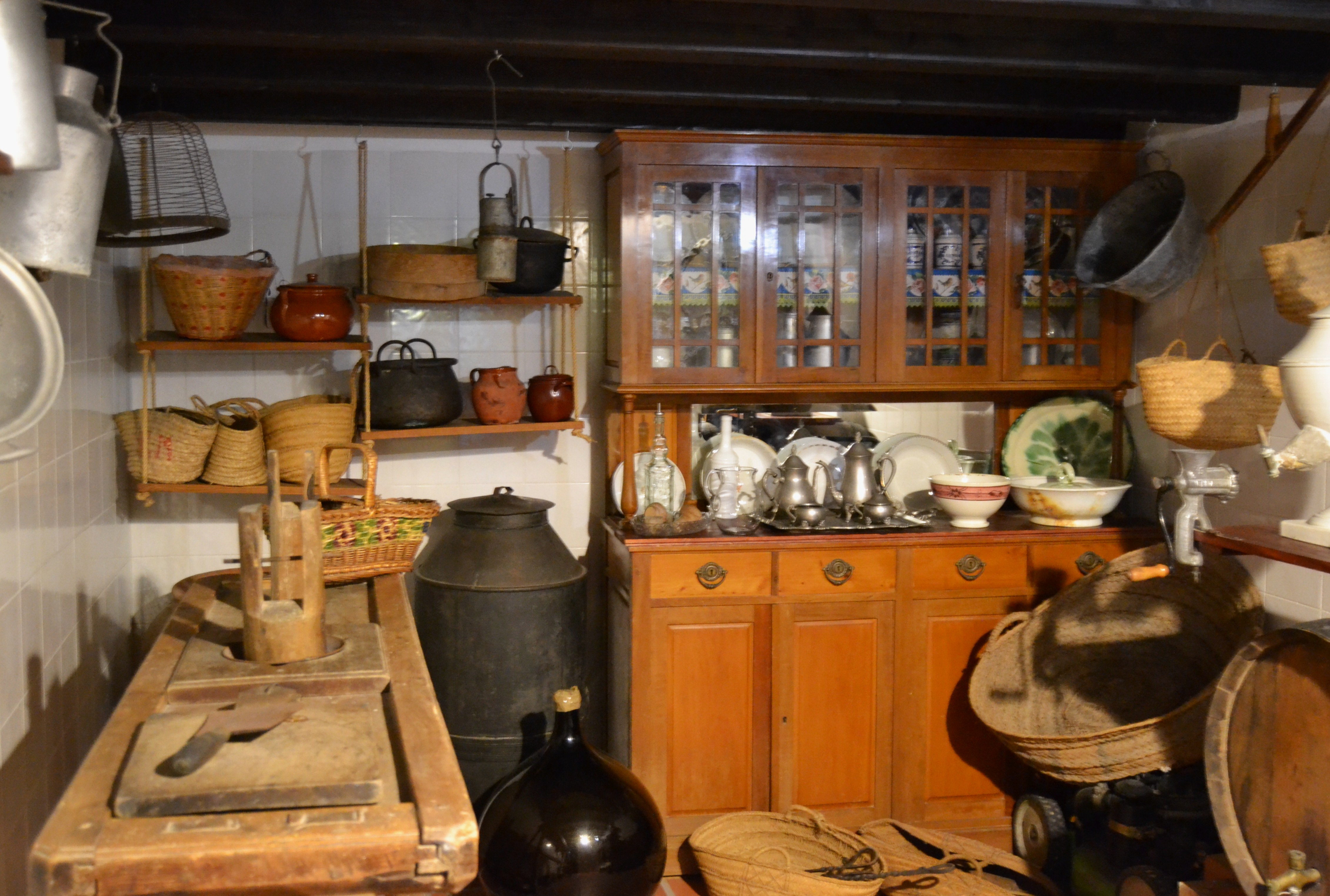 Casa Orduña del Castell de Guadalest, rebost.